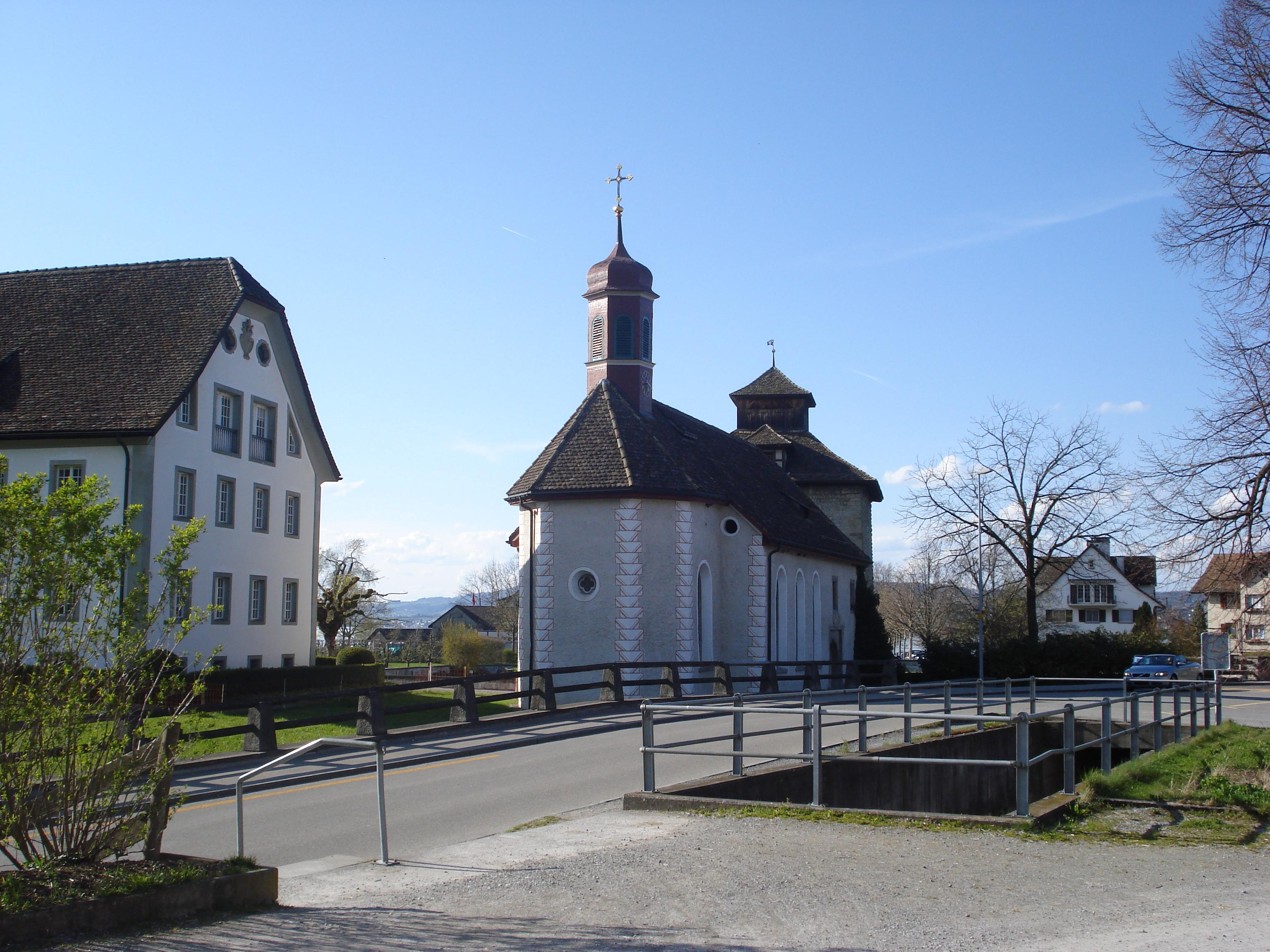 Kapelle der Schlossanlage Pfäffikon SZ